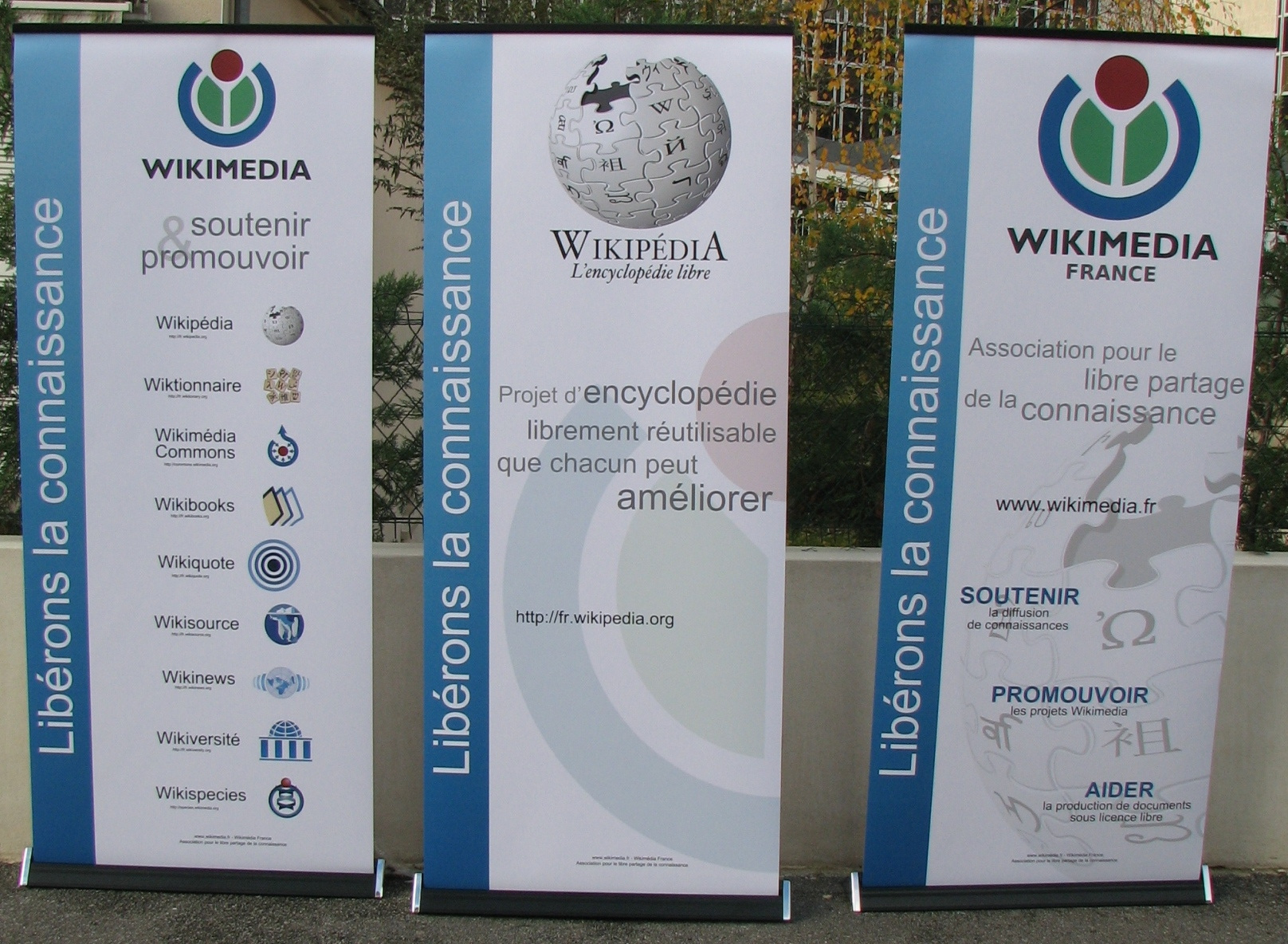 Dérouleurs de Wikimédia France Les logos représentés sur ces dérouleurs sont sous copyright de la fondation Wikimedia.